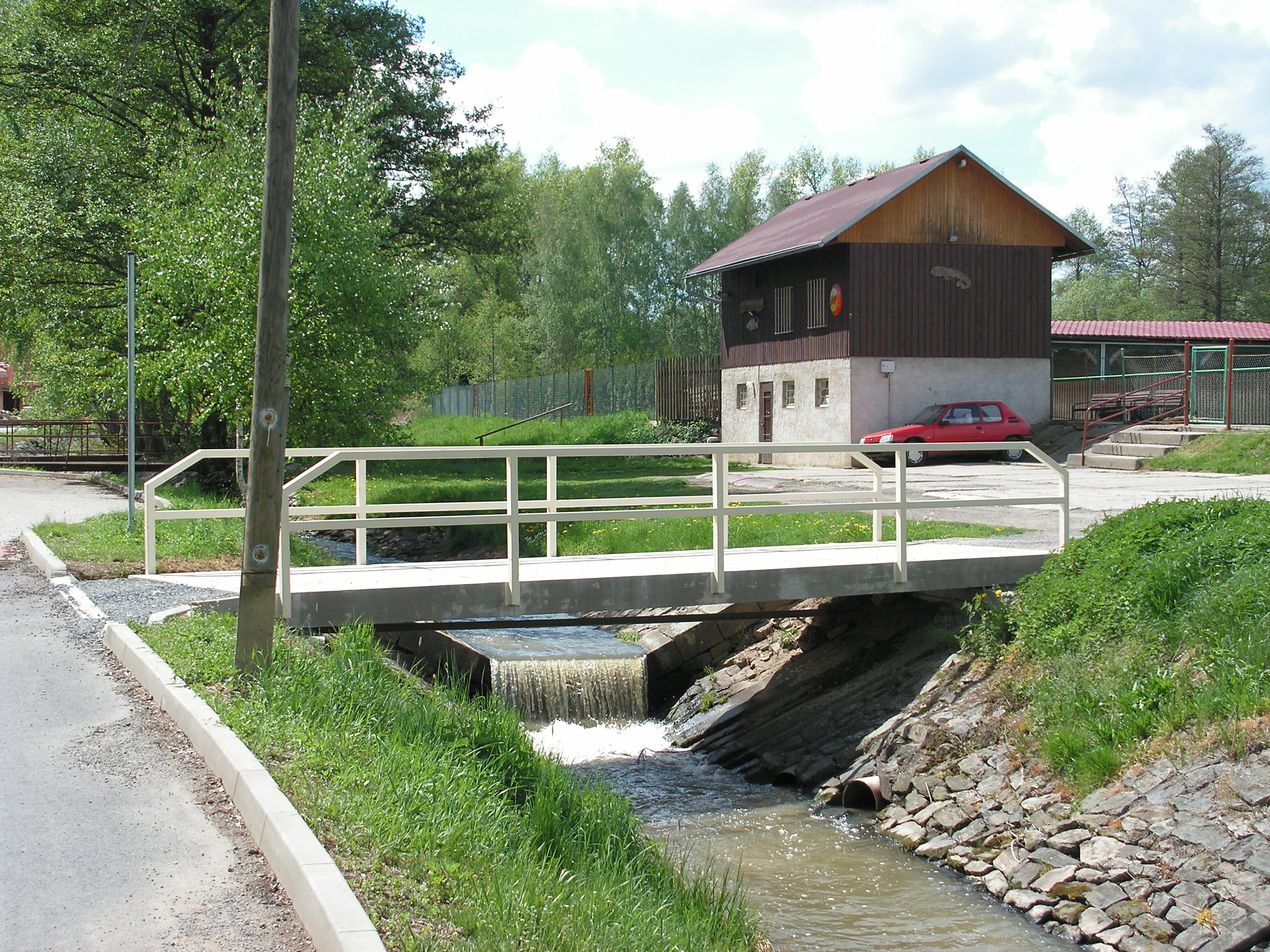 Potok Žabinec v Havlíčkově Brodě.